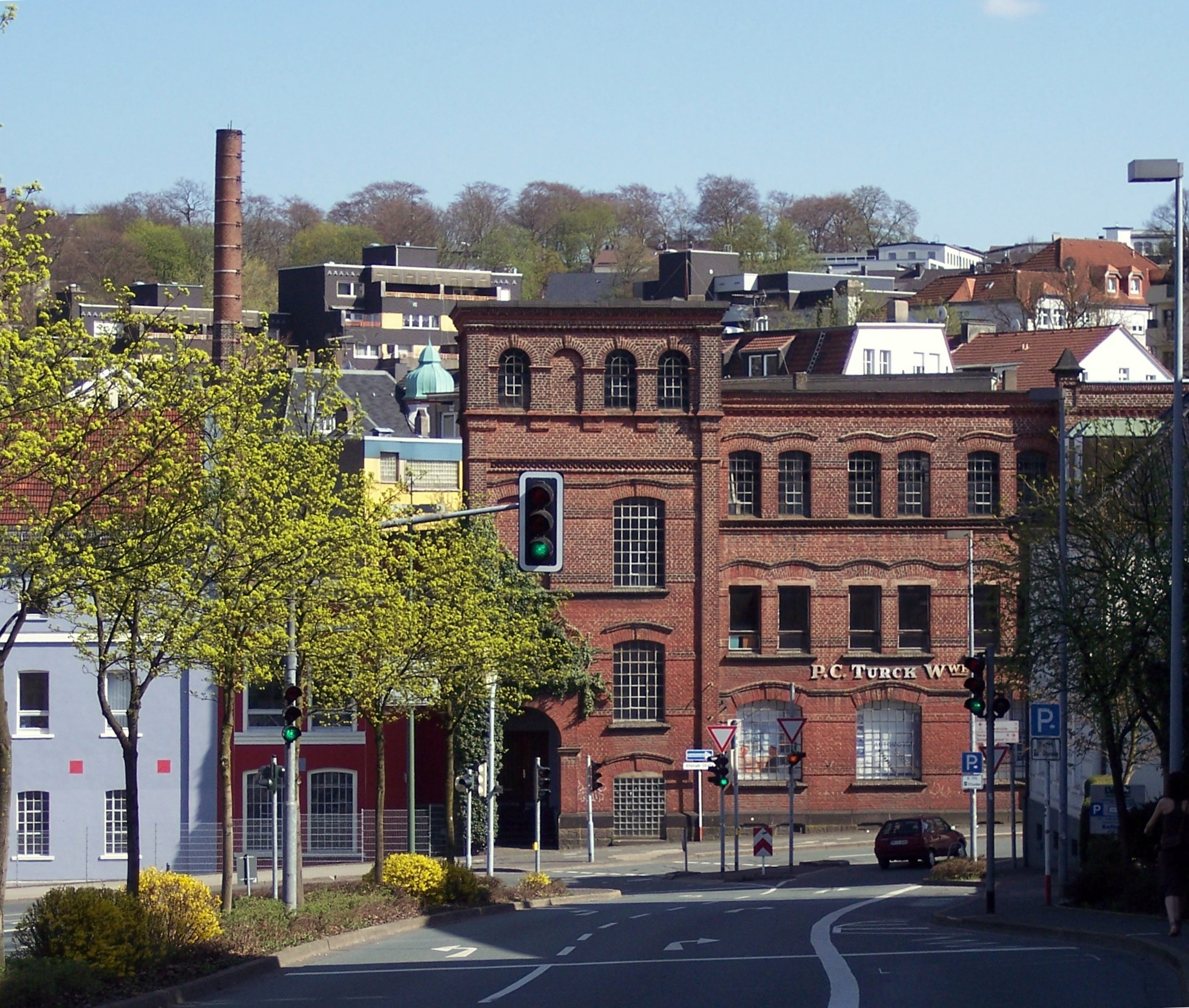 Fabrik Turck, Lüdenscheid